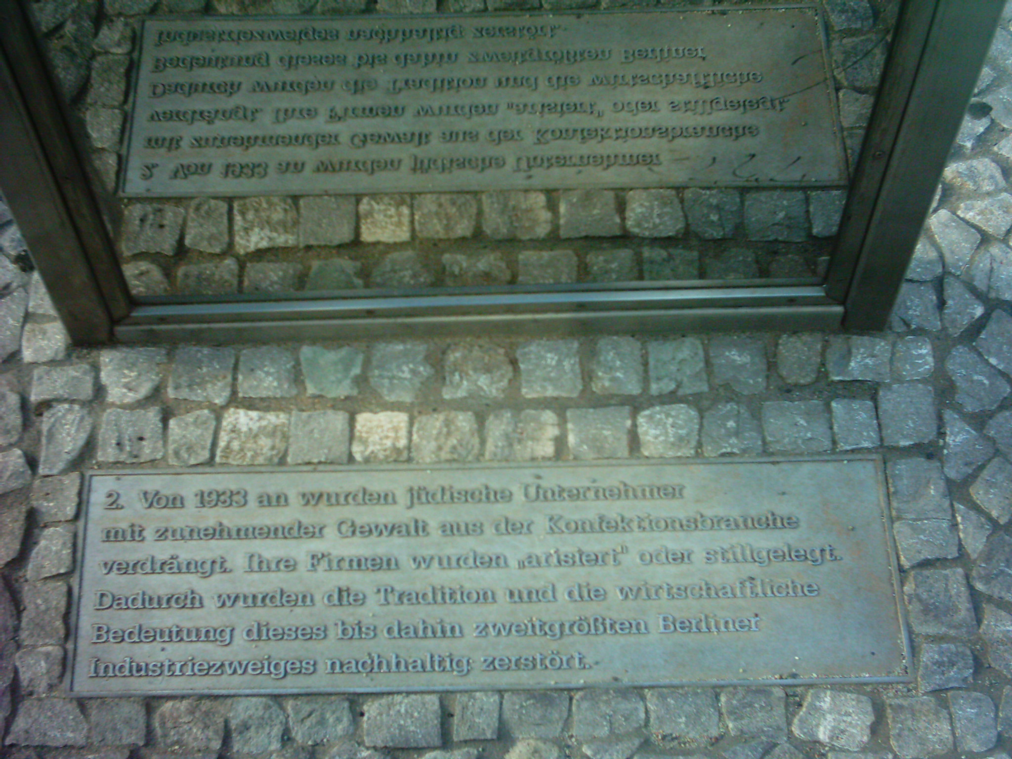 Denkzeichen Modezentrum Hausvogteiplatz am Berliner Hausvogteiplatz vom 16.07.2005 (Nahinnenansicht) Fotograf: Jens Lordan Dateistatus: GNU-FDL